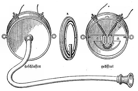 Motiv: Gowerscher Fernsprecher (Querschnitt) Bearbeitung: Agon S. Buchholz (asb)